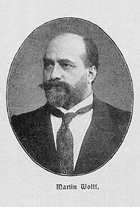 Portrait des Bildhauers Martin Wolff, vor 1907